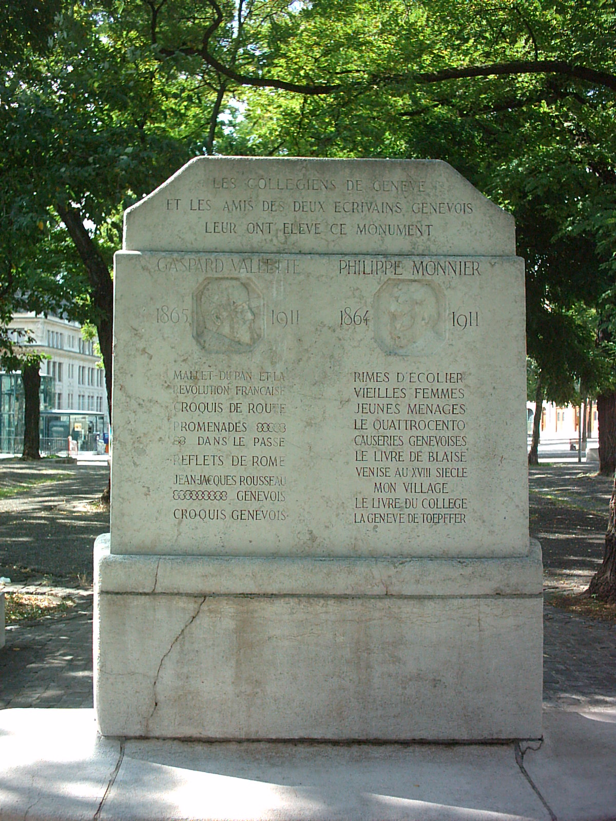 Monument dédié aux écrivains genevois Gaspard Vallette et Philippe Monnier (Suisse)